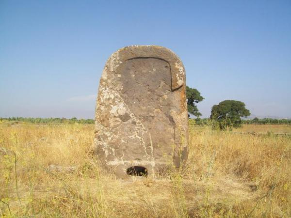 Tomba di giganti di Santu Bainzu (Borore)